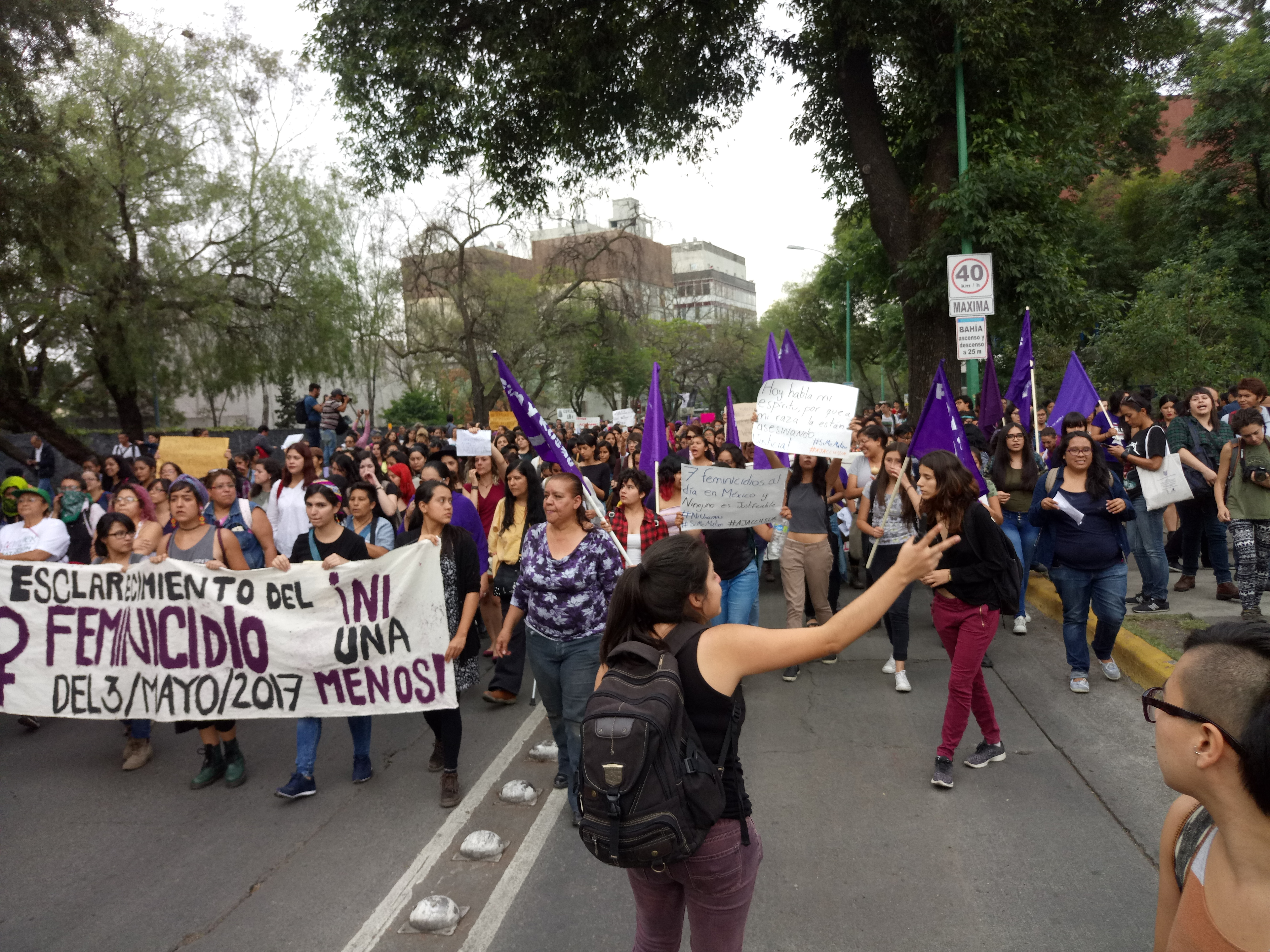 El 3 de mayo aparece Lesby Berlin Osorio asesinada en los jardines de la Ciudad Universitaria de la UNAM. Fue revictimizada por autoridades y medios de comunicación